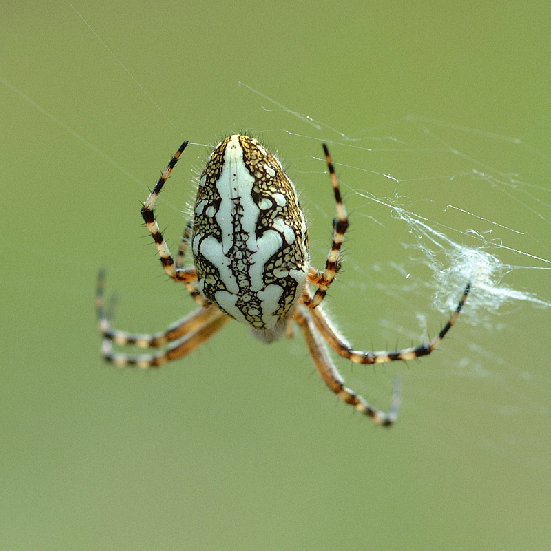 Aculepeira ceropegia, Darmstadt, Deutschland